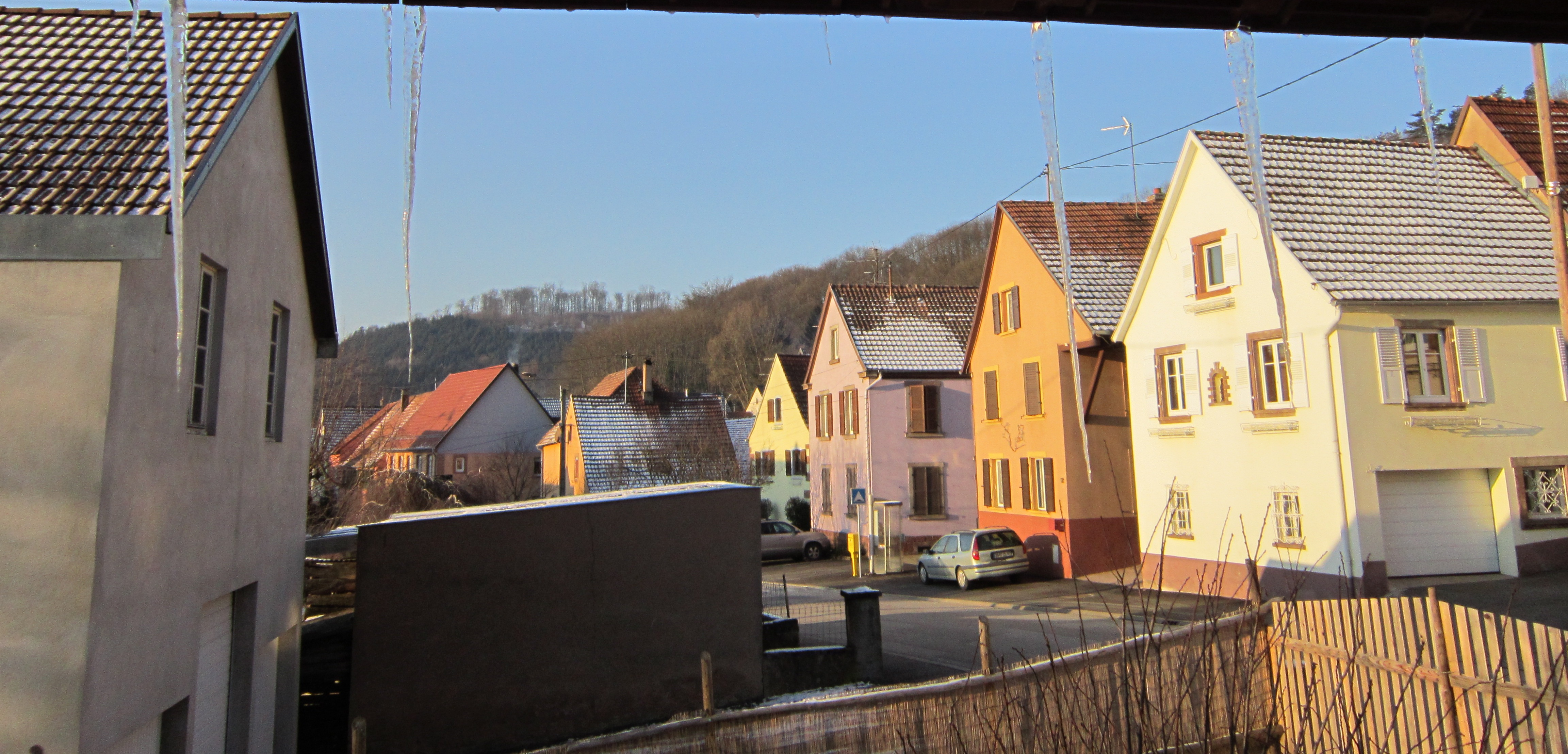 Vue d'une partie du village d'Eckartswiller durant l'hiver 2011-2012